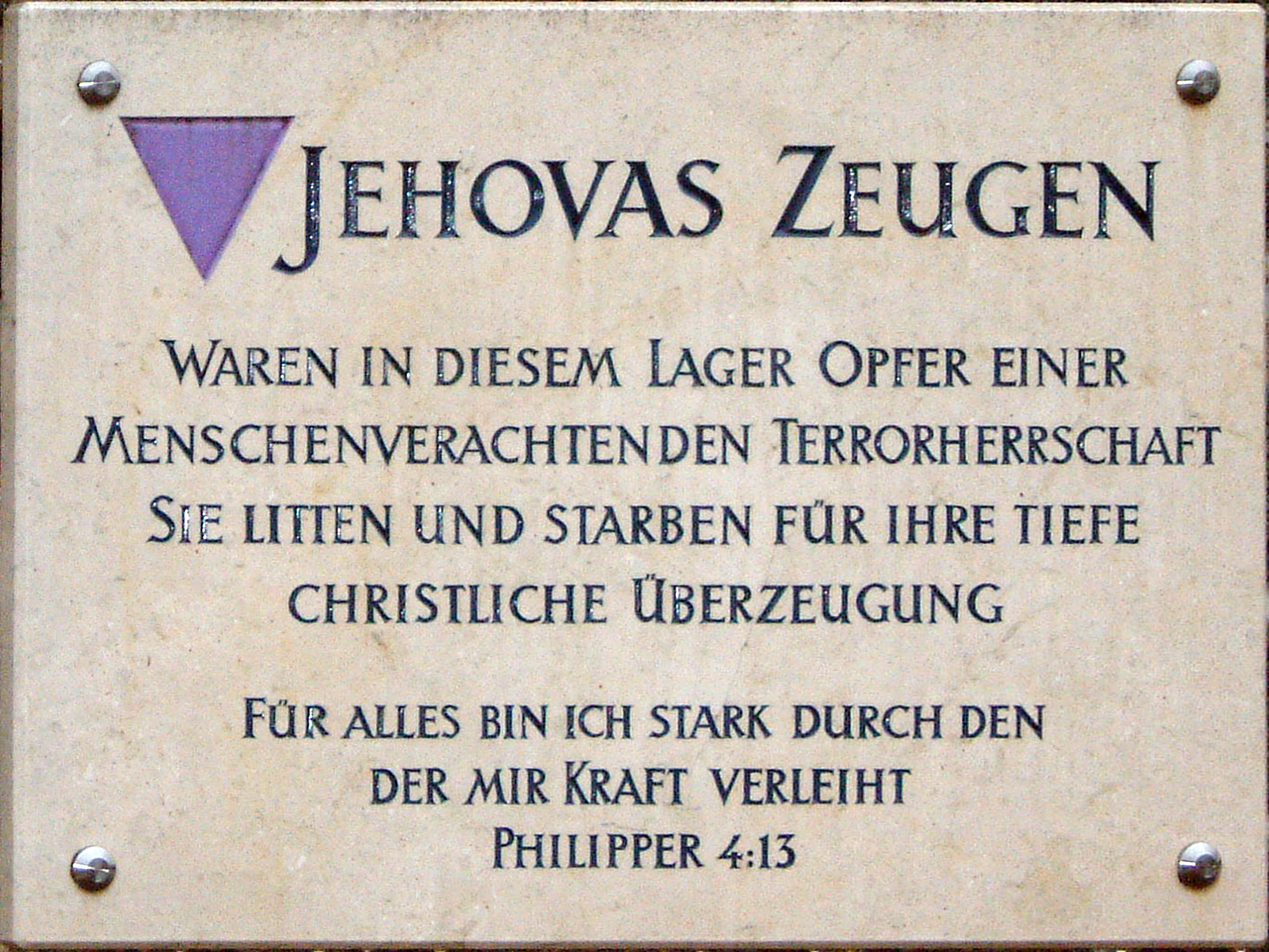 Mahntafel für Zeugen Jehovs im KZ Mauthausen, Oberösterreich